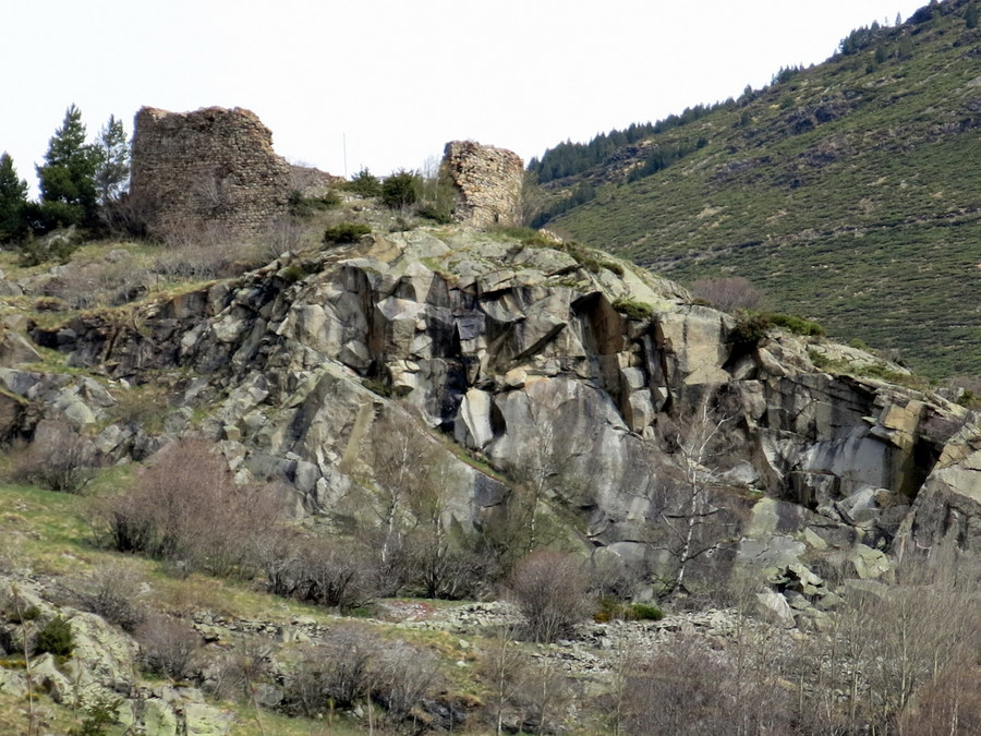 Torre Cerdana - Cerdanya francesa